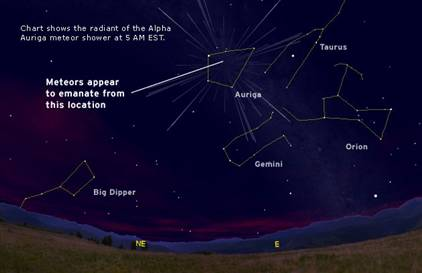 Ауригиди